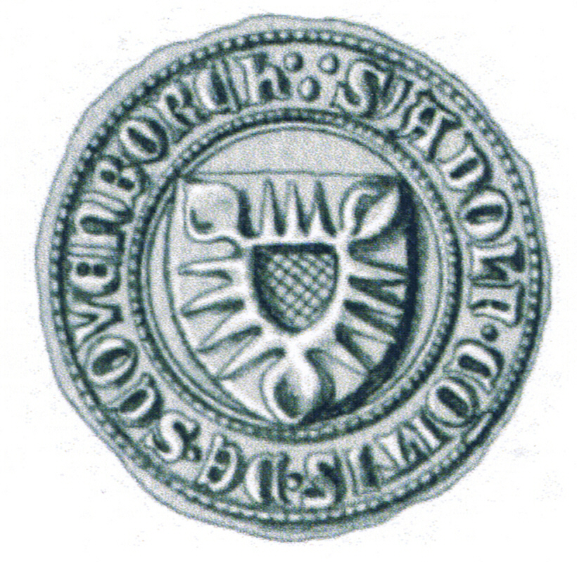 Siegel des Adolf VIII., Sohn des Adolf II., des Jüngeren von Schauenburg und Pinneberg und der Heilwig von Lippe. Das Siegel stammt aus der Zeit um 1362.